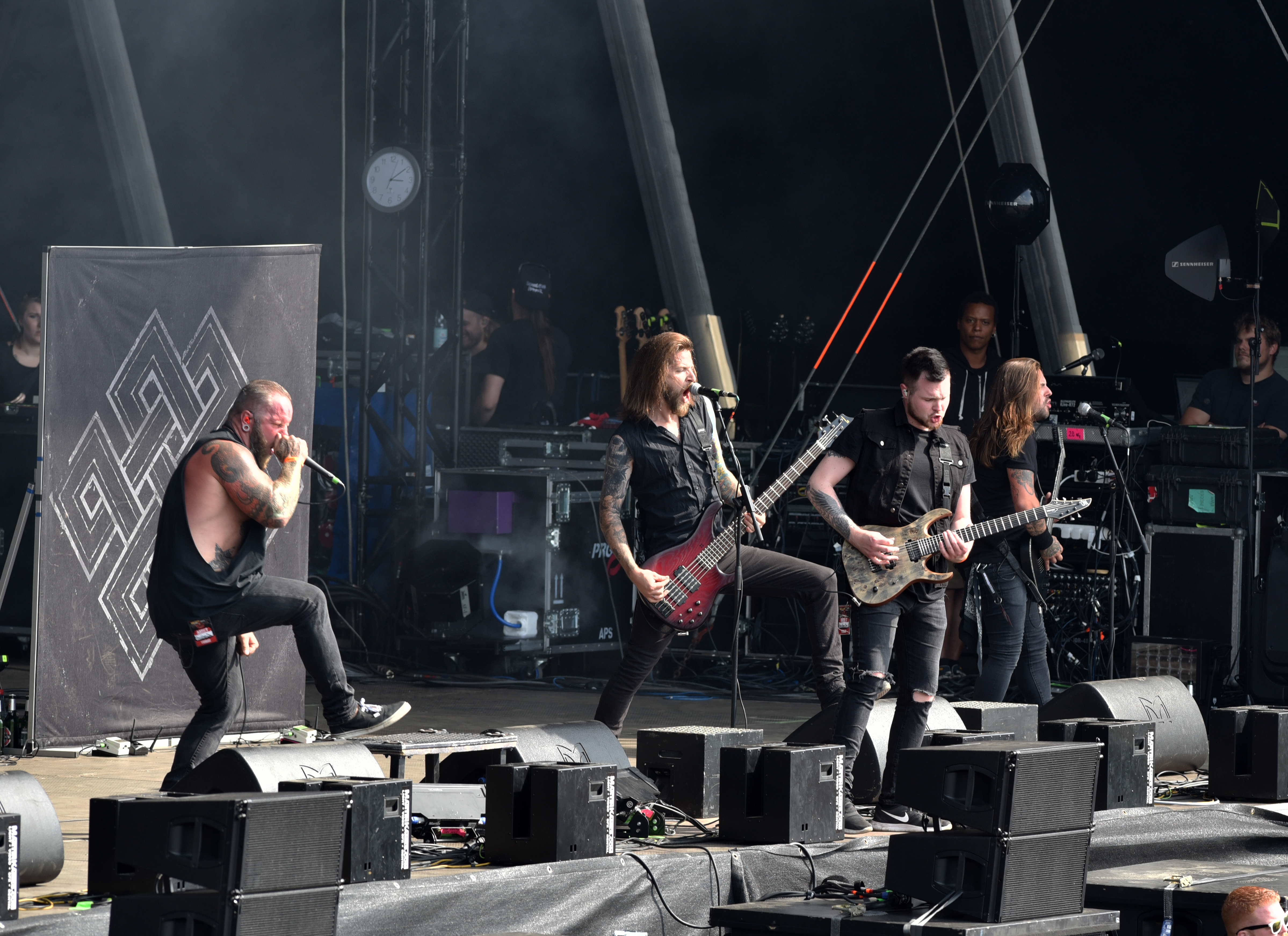 Any Given Day beim Reload Festival 2017